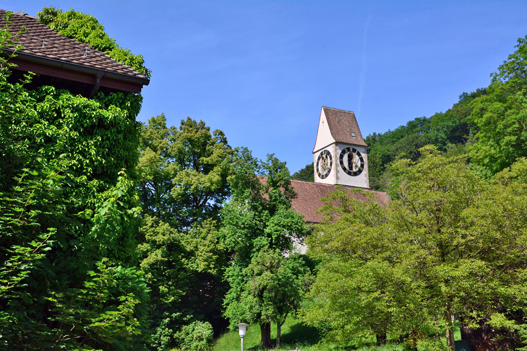 Stallikon ZH, Kirche